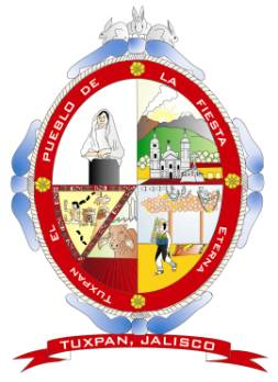 tux coa